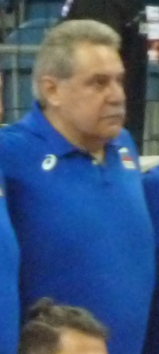 Zdjęcie zrobione podczas Memoriału Huberta Jerzego Wagnera 2017